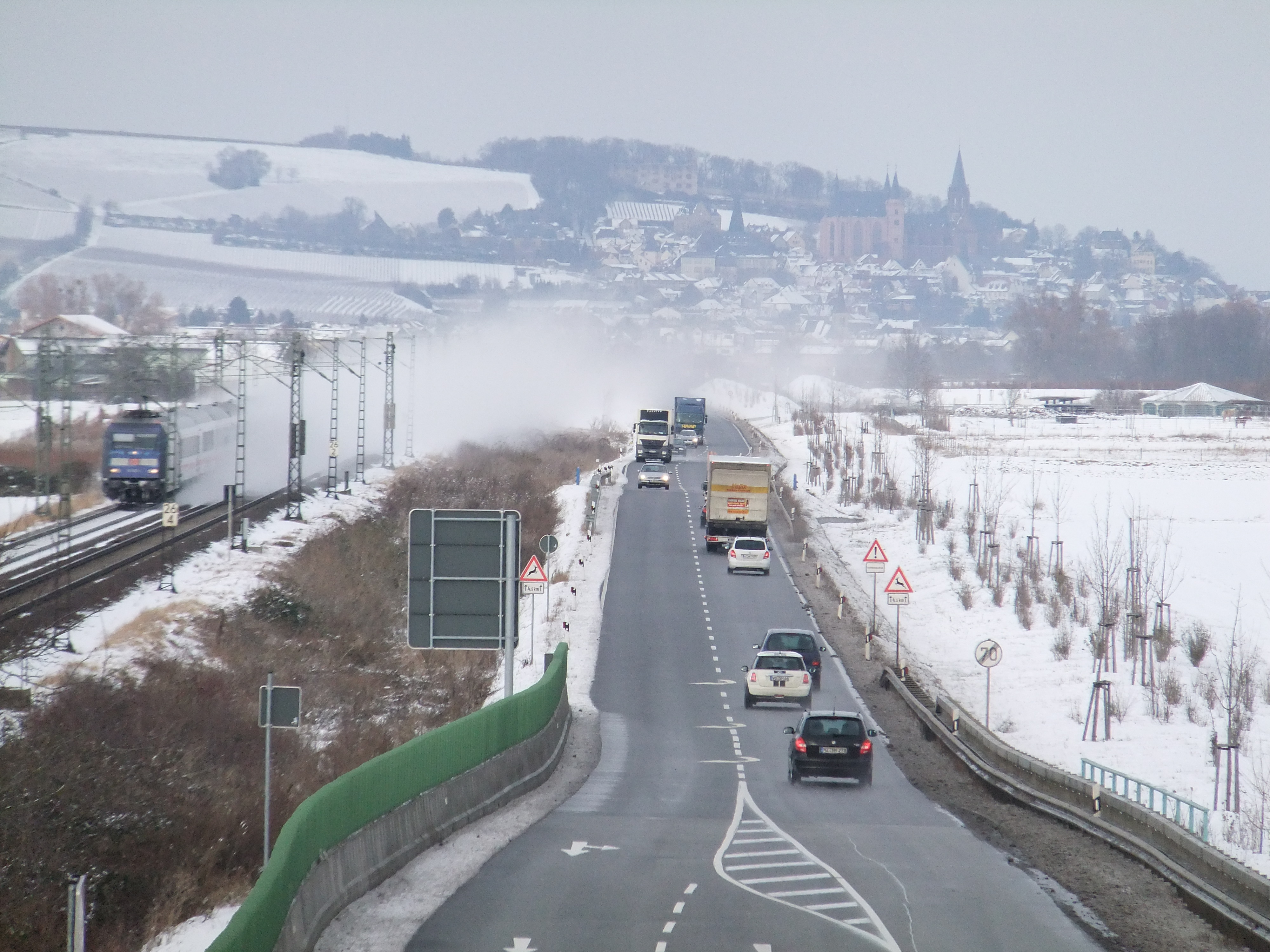 Schneegestöber bei Vorbeifahrt eines InterCity-Zuges mit einer Lokomotive der DBAG-Baureihe 101 an der Bundesstraße 9 in der Nähe von Guntersblum in Rheinhessen. Im Hintergrund ist Oppenheim zu sehen.